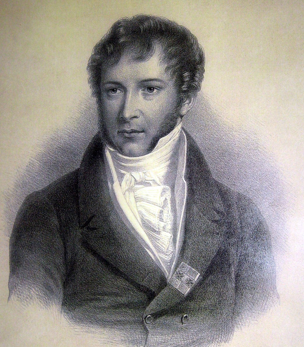 Michal Kleofas Oginski